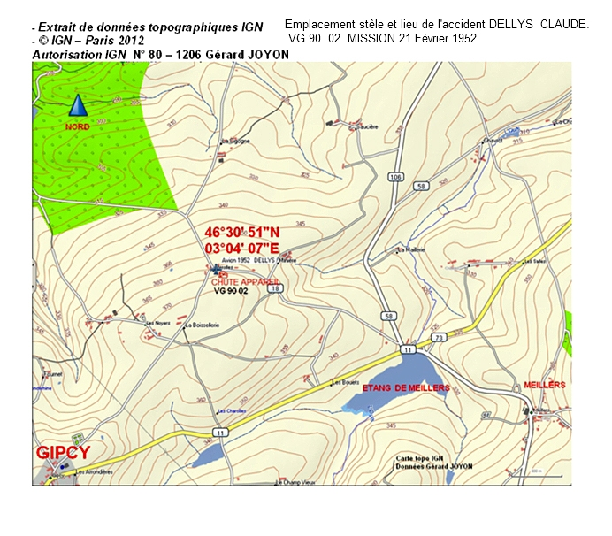 Cet extrait représente le lieu de la chute de l'avion en 1952. Différents renseignements topographiques et repères cartographiques effectués par Gérard JOYON. Carte reprise pour données avec autorisation IGN. Février 2012. On y trouve la localisation précise de la stèle et les repères importants . Les coordonnées géographiques de l'impact.